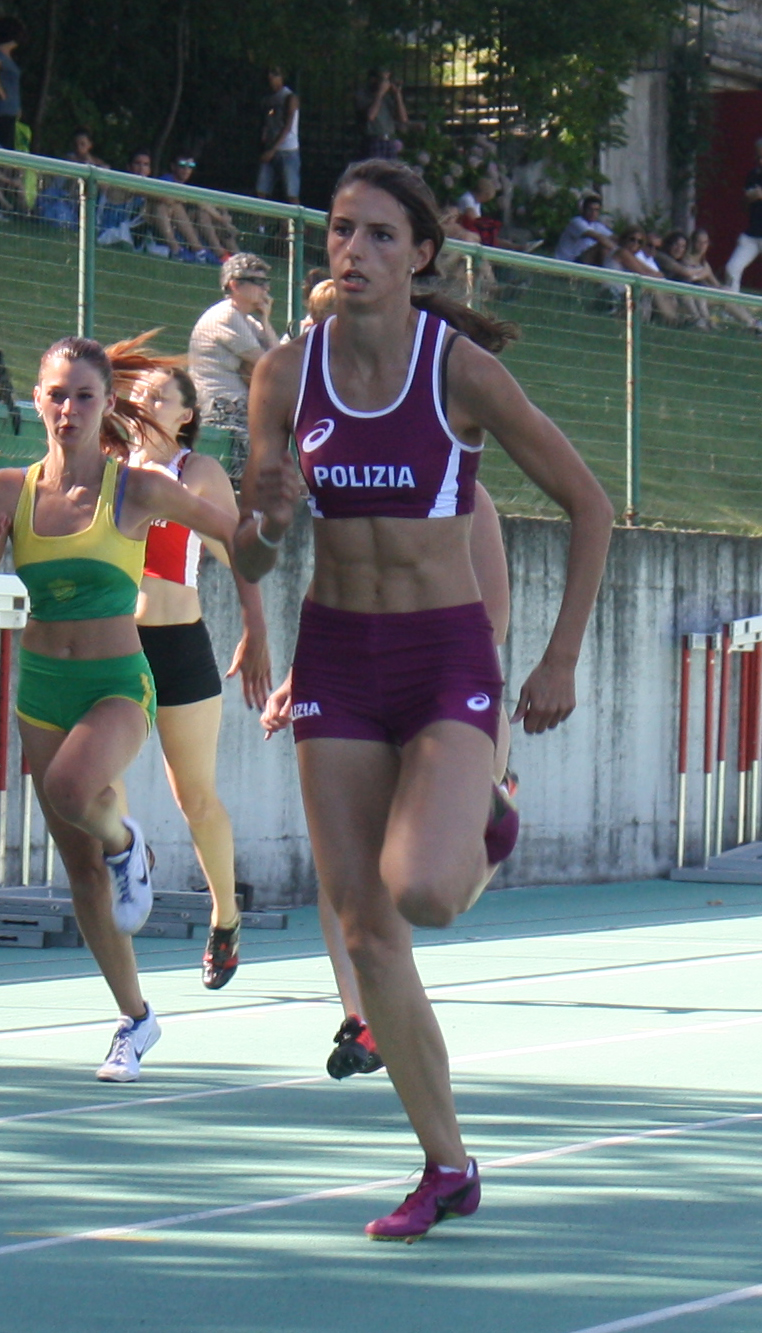 L'atleta italiana Giulia Riva il 16 luglio 2016, durante un meeting regionale a Olgiate Olona.